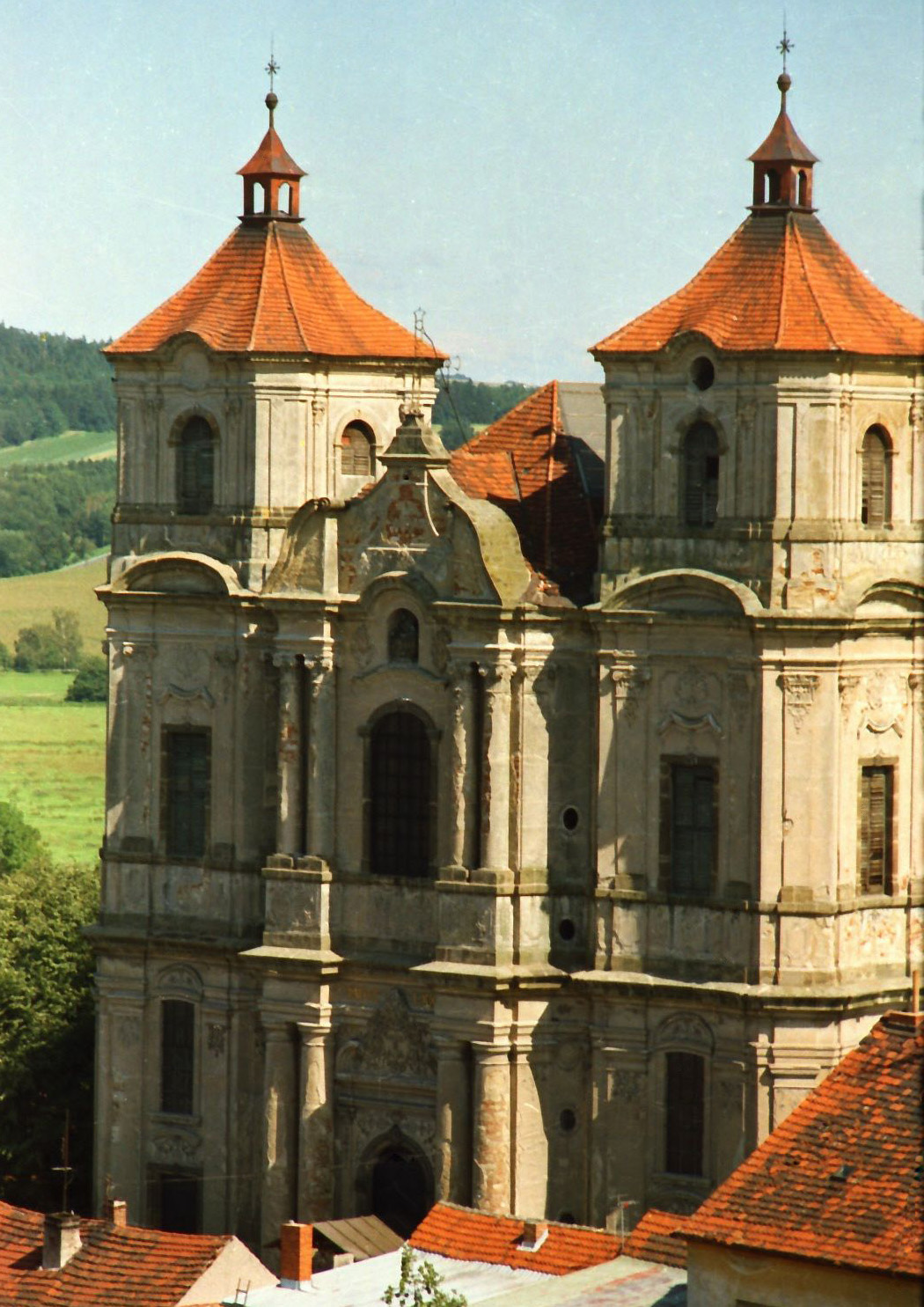 Kostel Nanebevzetí Panny Marie v Přeštiích před opravou a dostavbou věží